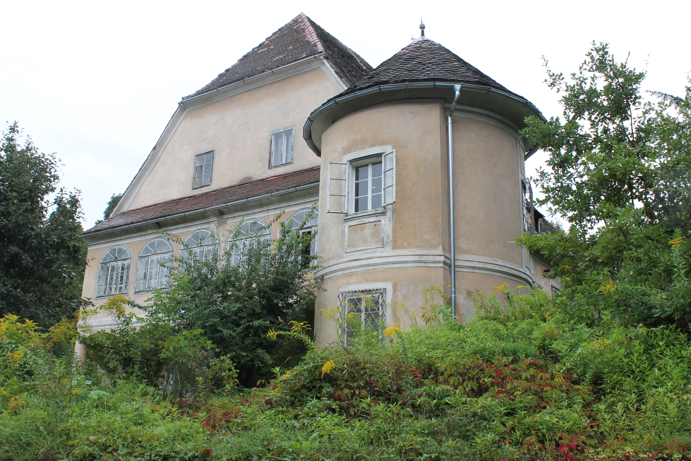 Schloss Talhof in der Katastralgemeinde Gößgraben-Göß in Leoben